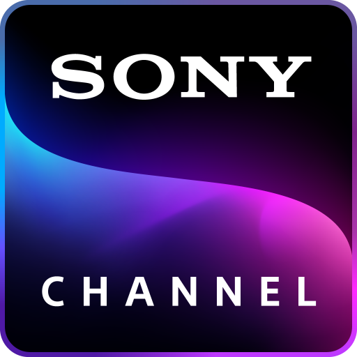 Logo actual desde el 12 de agosto de 2019